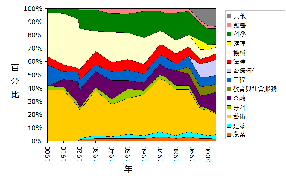 20世纪悉尼大学各院系学生数统计图中文繁体版。 （英文版 中文简体版）